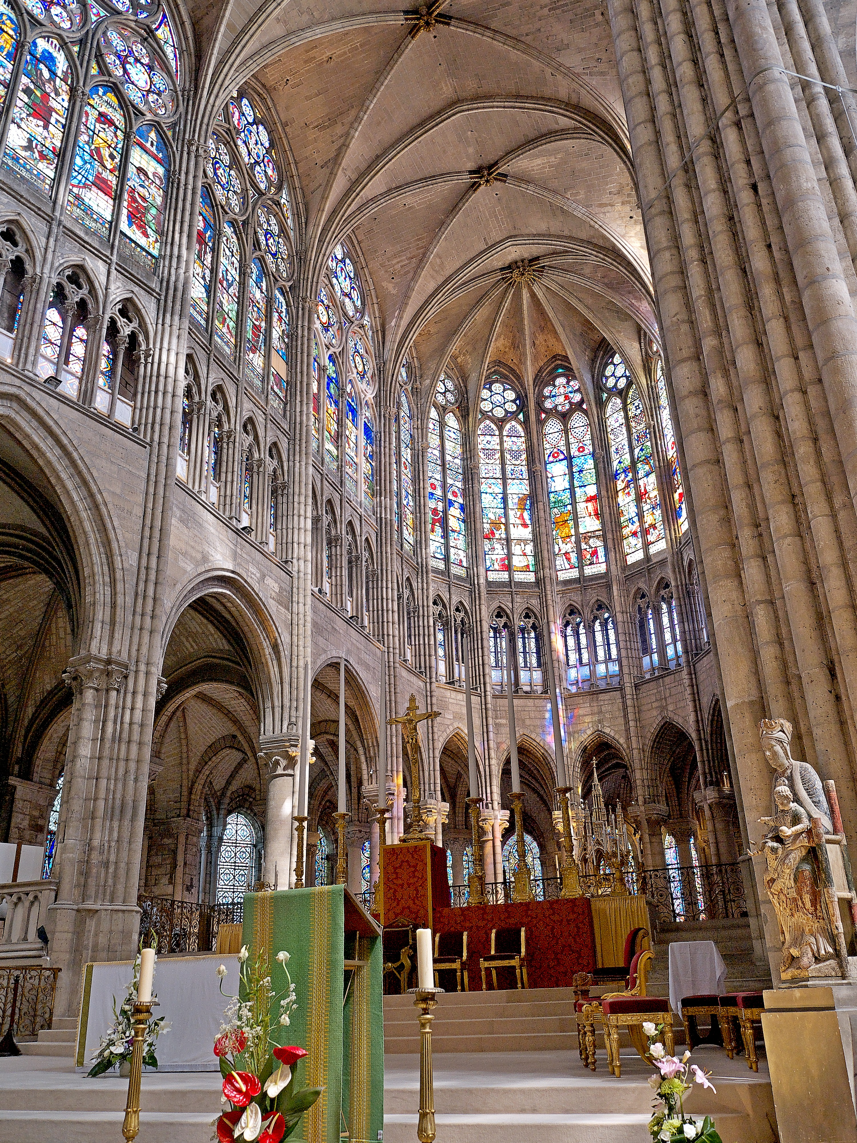 Vue du coeur de la basilique. .